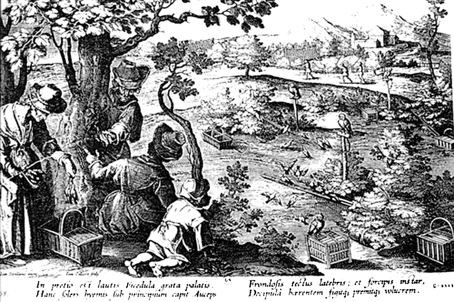 Chasse de la grive à la glue